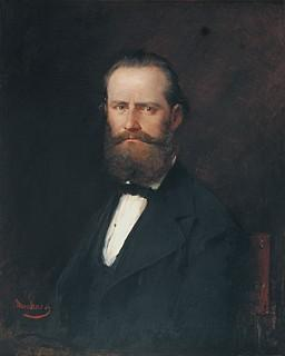 Portrait de Charles Sedelmeyer (1837-1925)